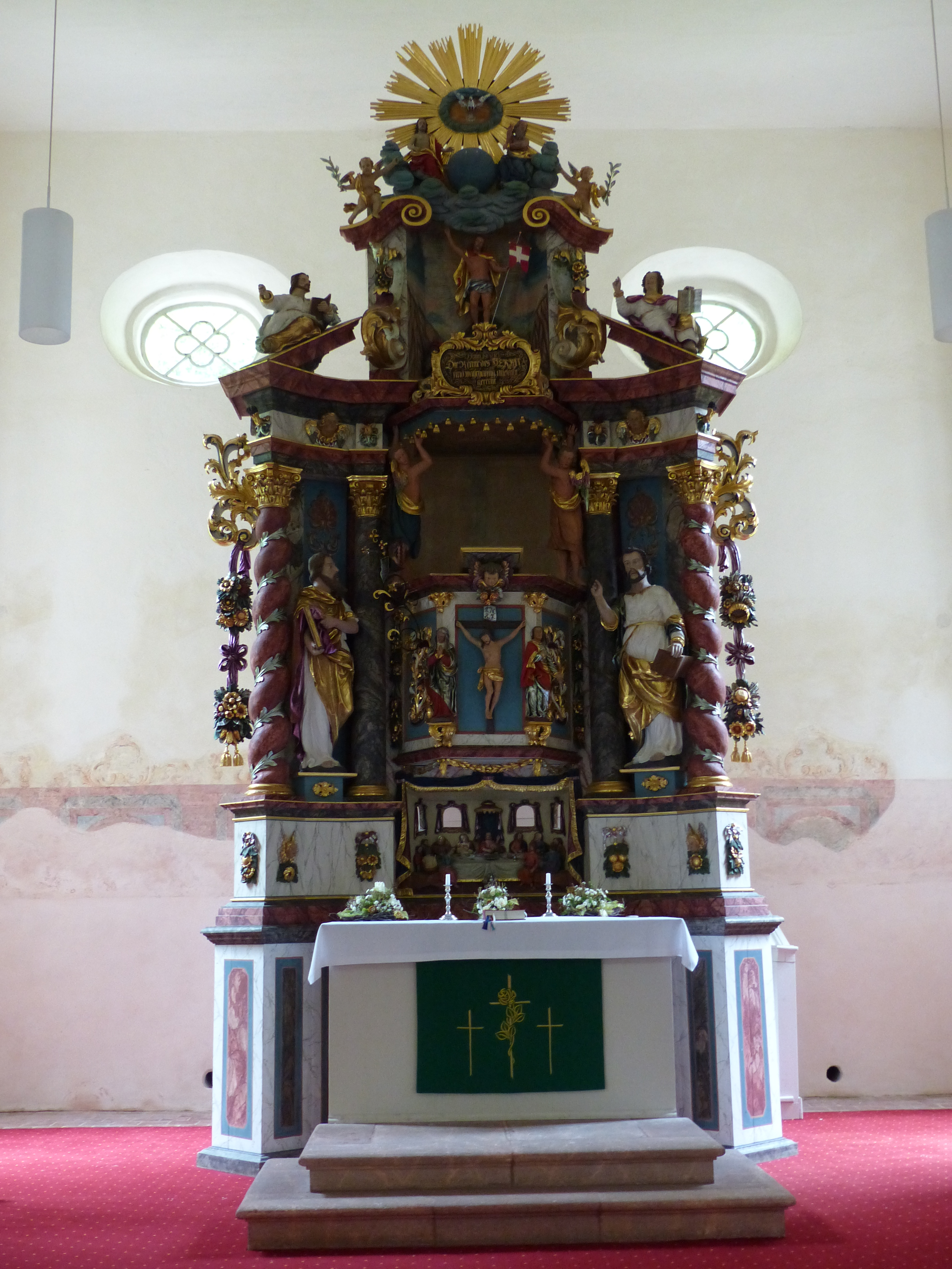 Wiedersberg, Gemeinde Triebel/Vogtl., Kanzelaltar der Kirche St. Michaelis